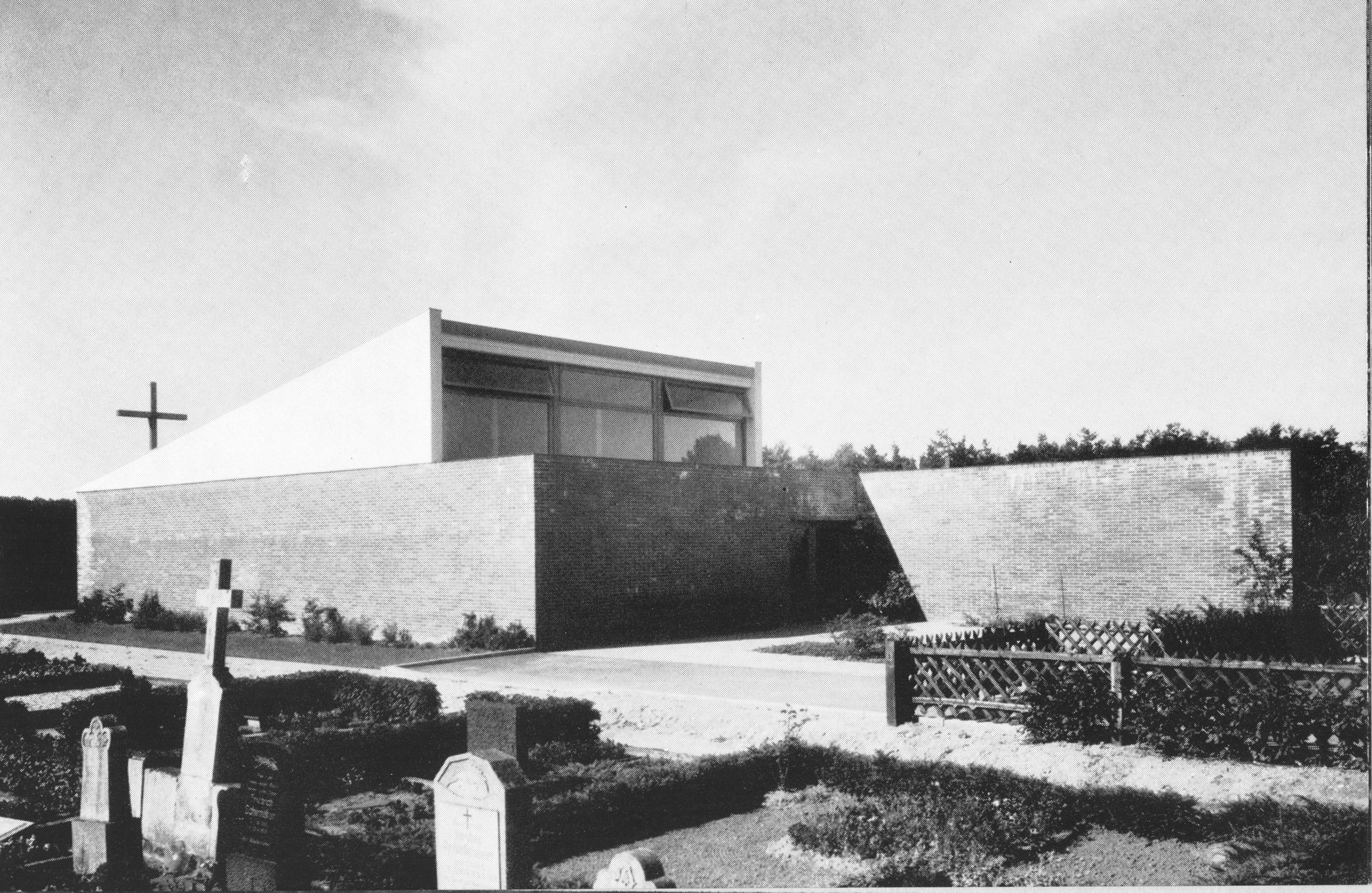 Die Friedhofshalle Waddenhausen oben eine Foto von 1963, sollte im Jahr 2017 abgerissen werden. Der Bürgertreff und seine Mitglieder haben diese übernommen und begannen mitte 2017 mit der Sanierung [11]